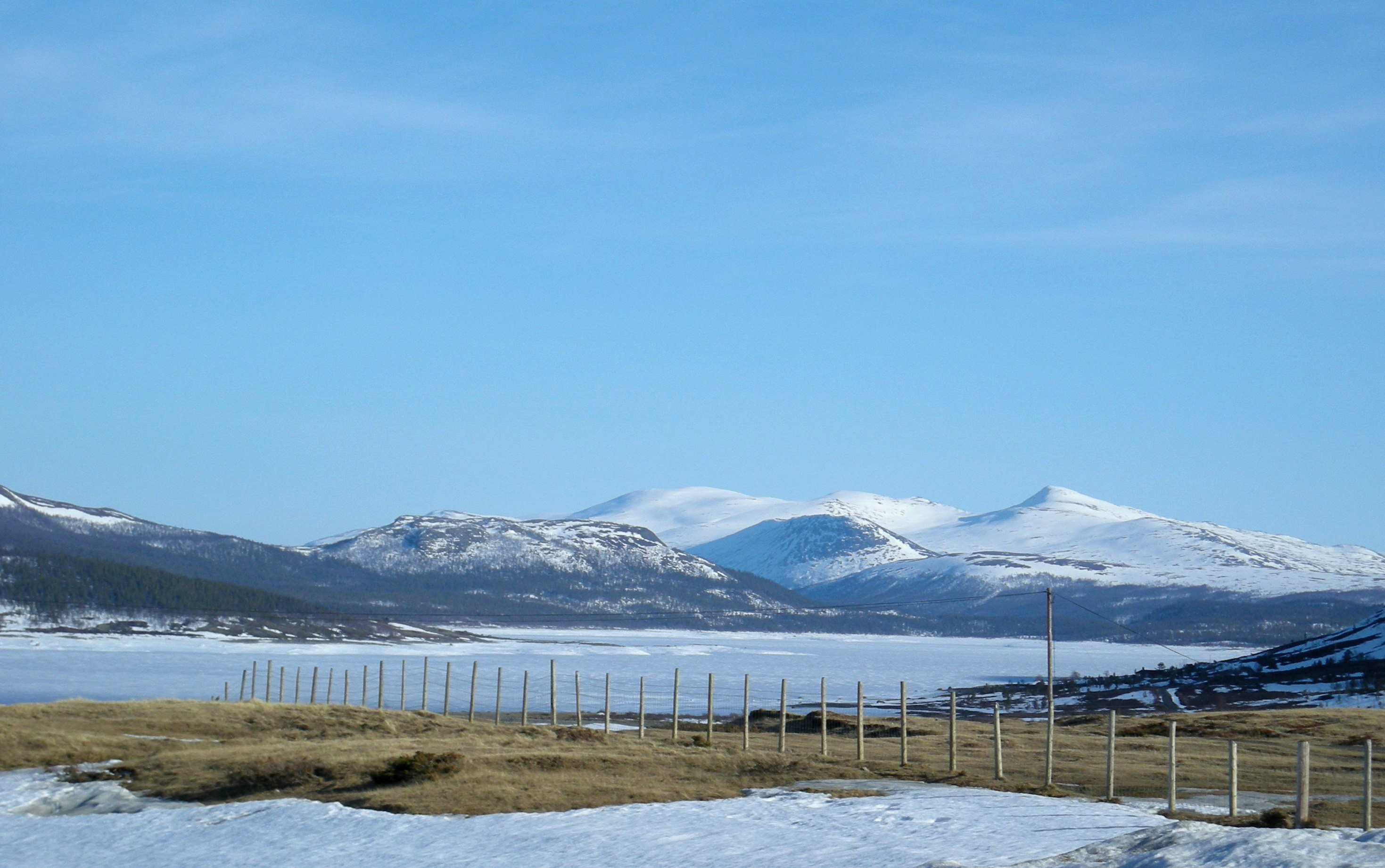 Innsjøen Tesse like ved Brimi seter i april